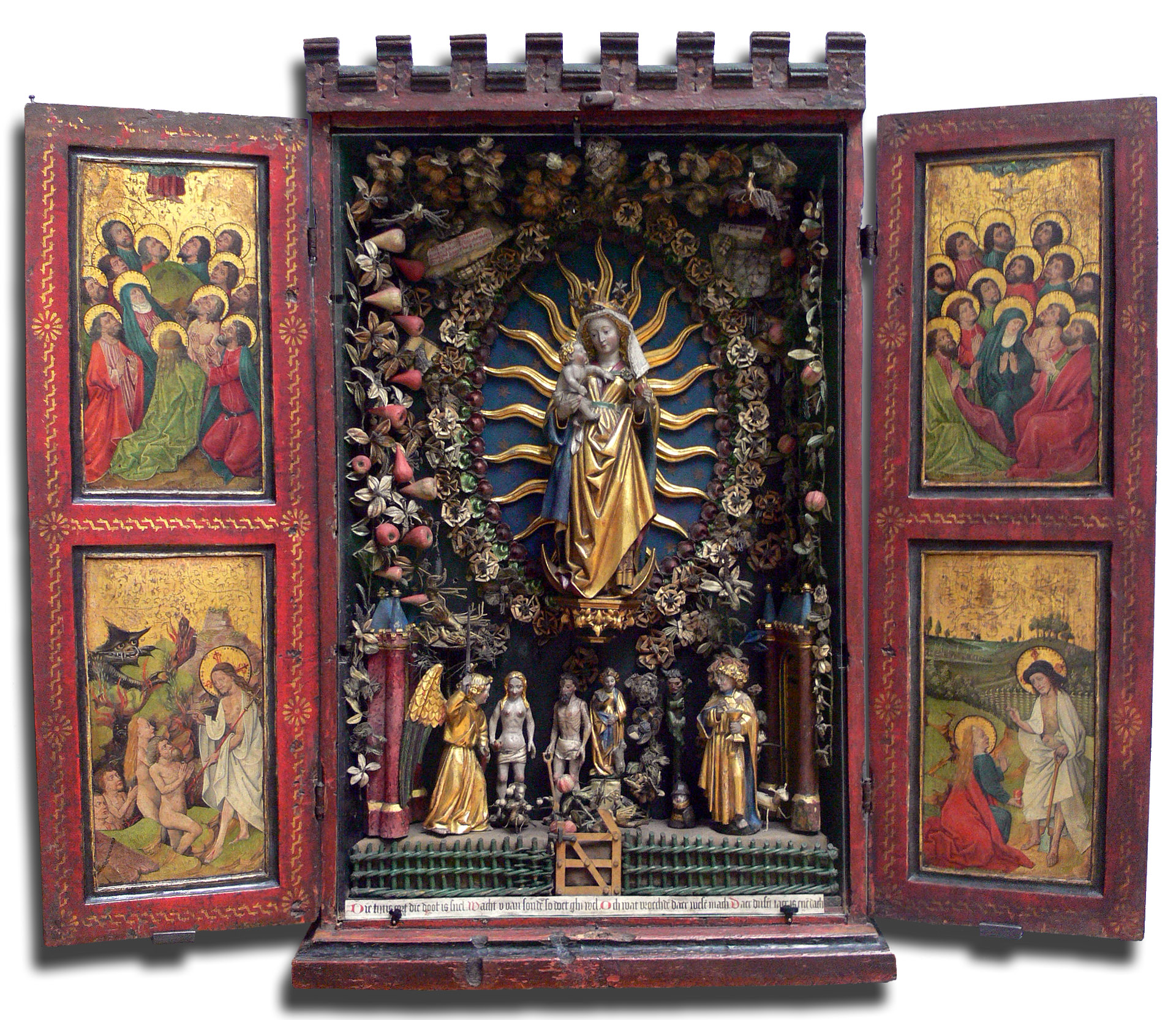 Hortus conclusus (Besloten Hofje) , brabant (vers 1594 ?) représentant Adam et Eve chassés du paradis